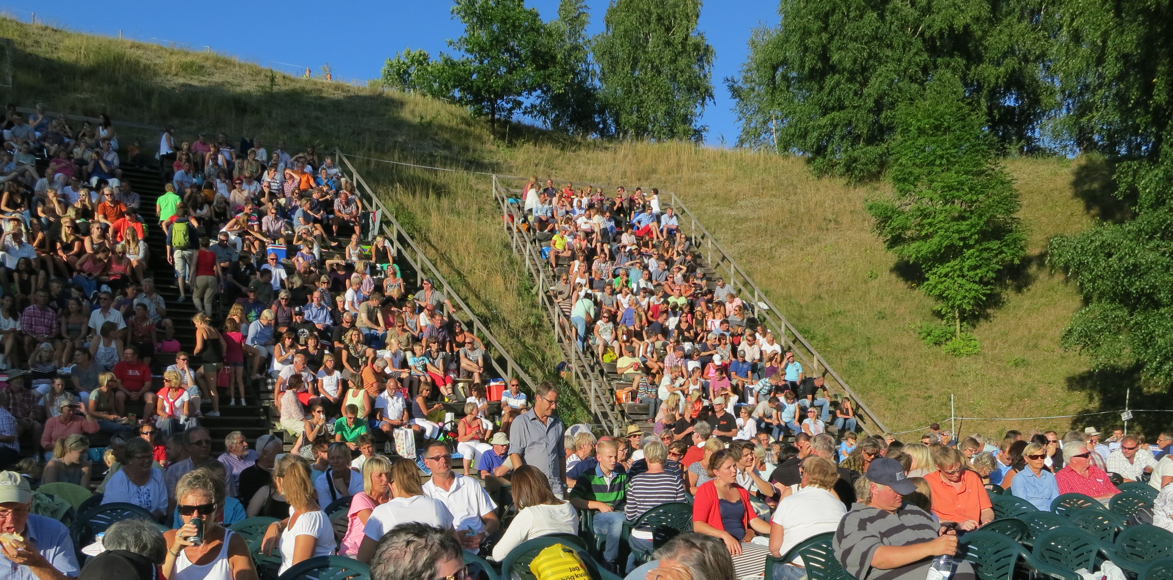 Publik på Sövde Amfiteater 2013